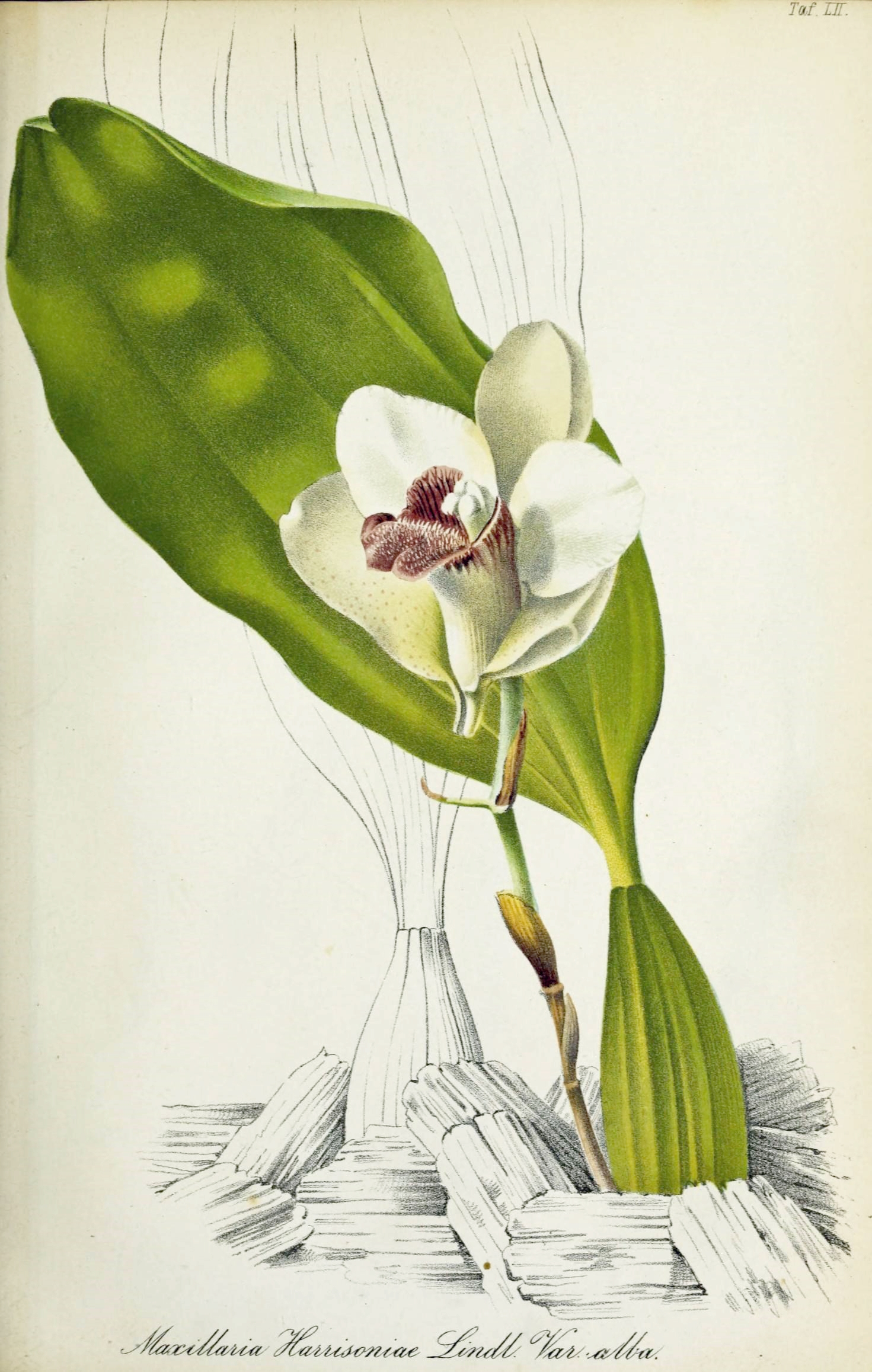 Taf. IE.